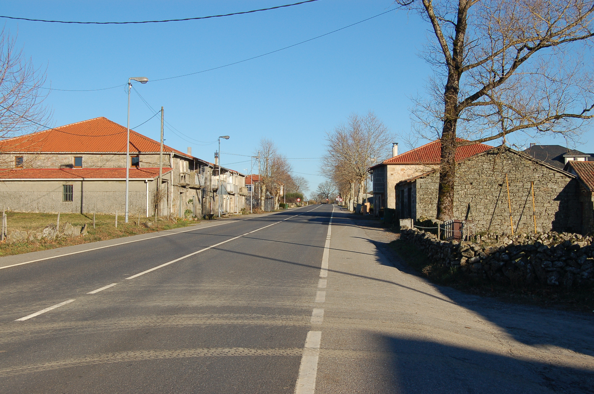 Estrada OU-536 (antiga N-120) ao seu paso pola Caseta, As Chás, Maceda